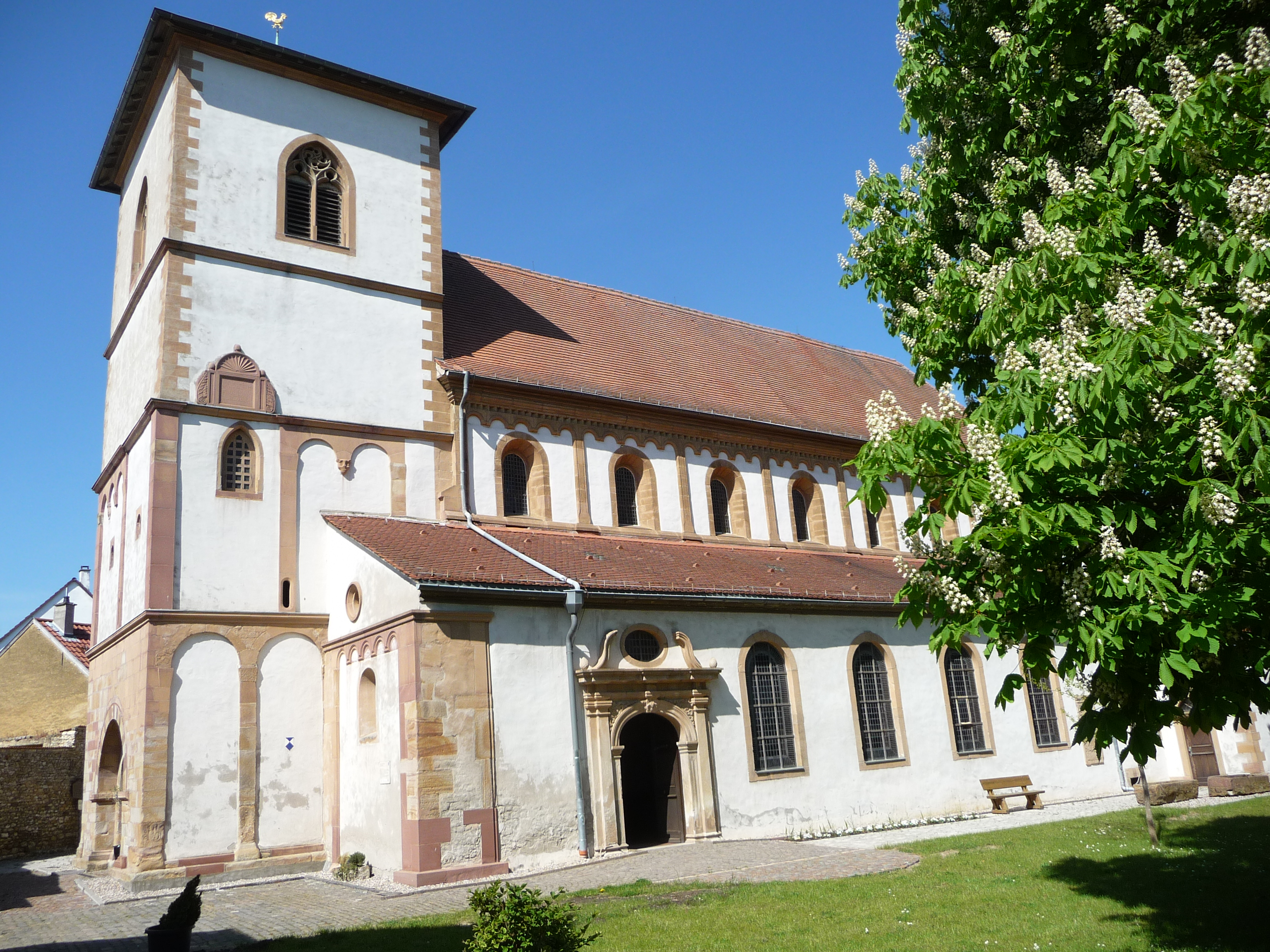 Die katholische Pfarrkirche St. Lambert ist ein denkmalgeschütztes Kirchengebäude in Bechtheim, Rheinland-Pfalz.